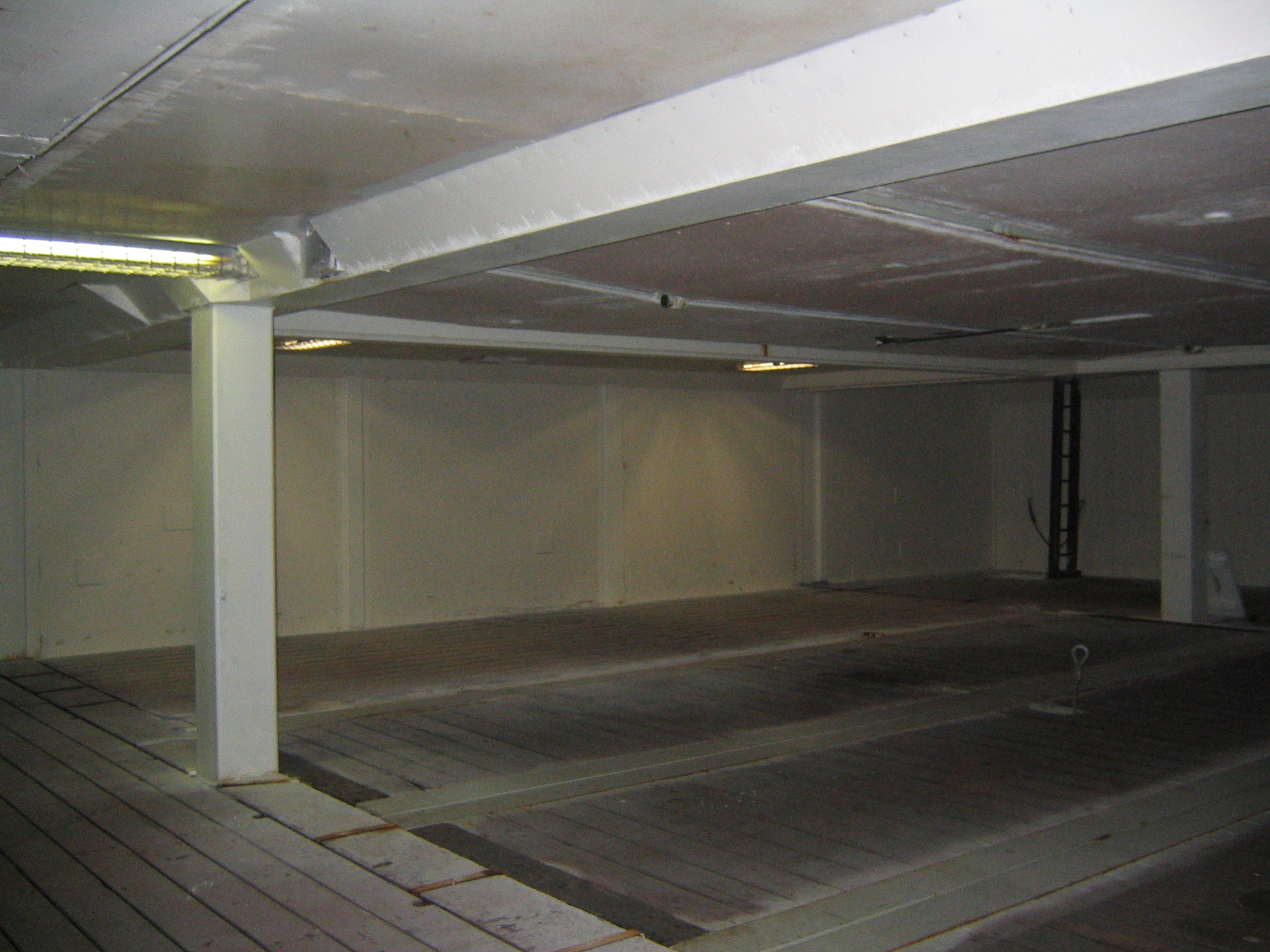 Tweendeck compartment